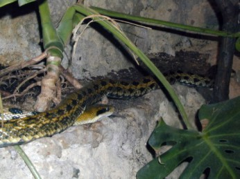 Elaphe taeniura friesi